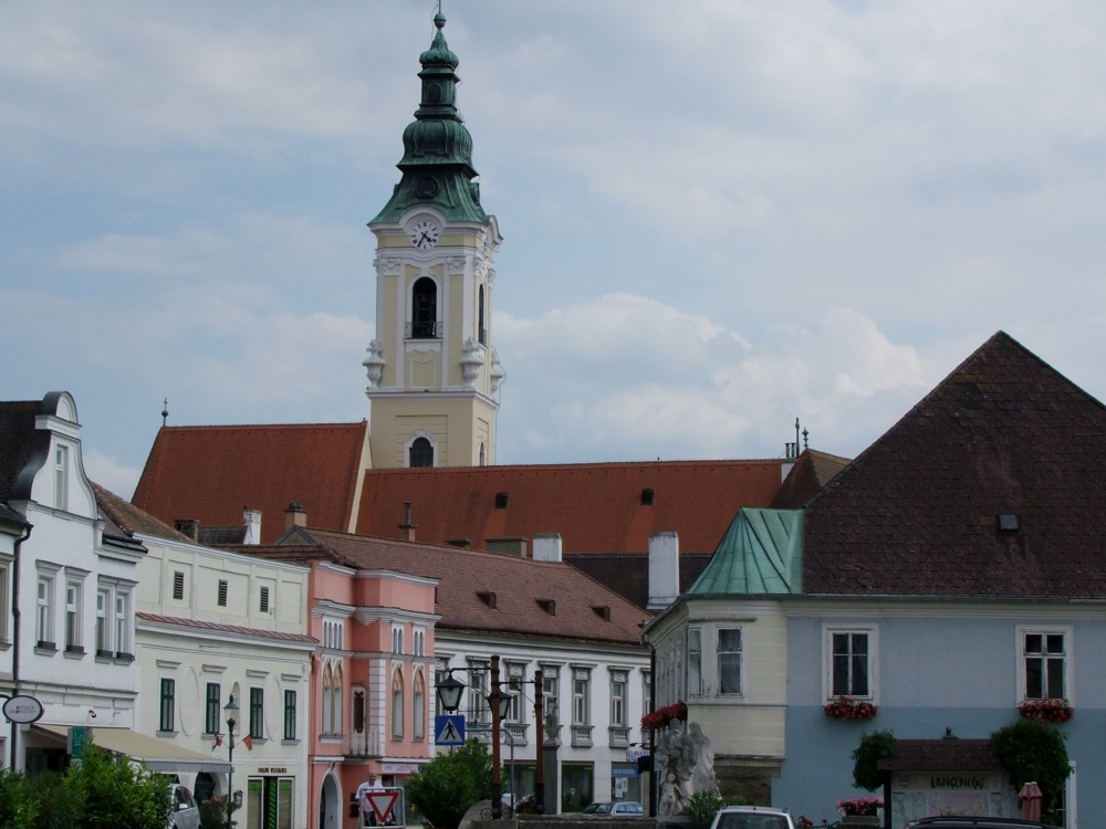 Langenlois Rathausstr Kirche